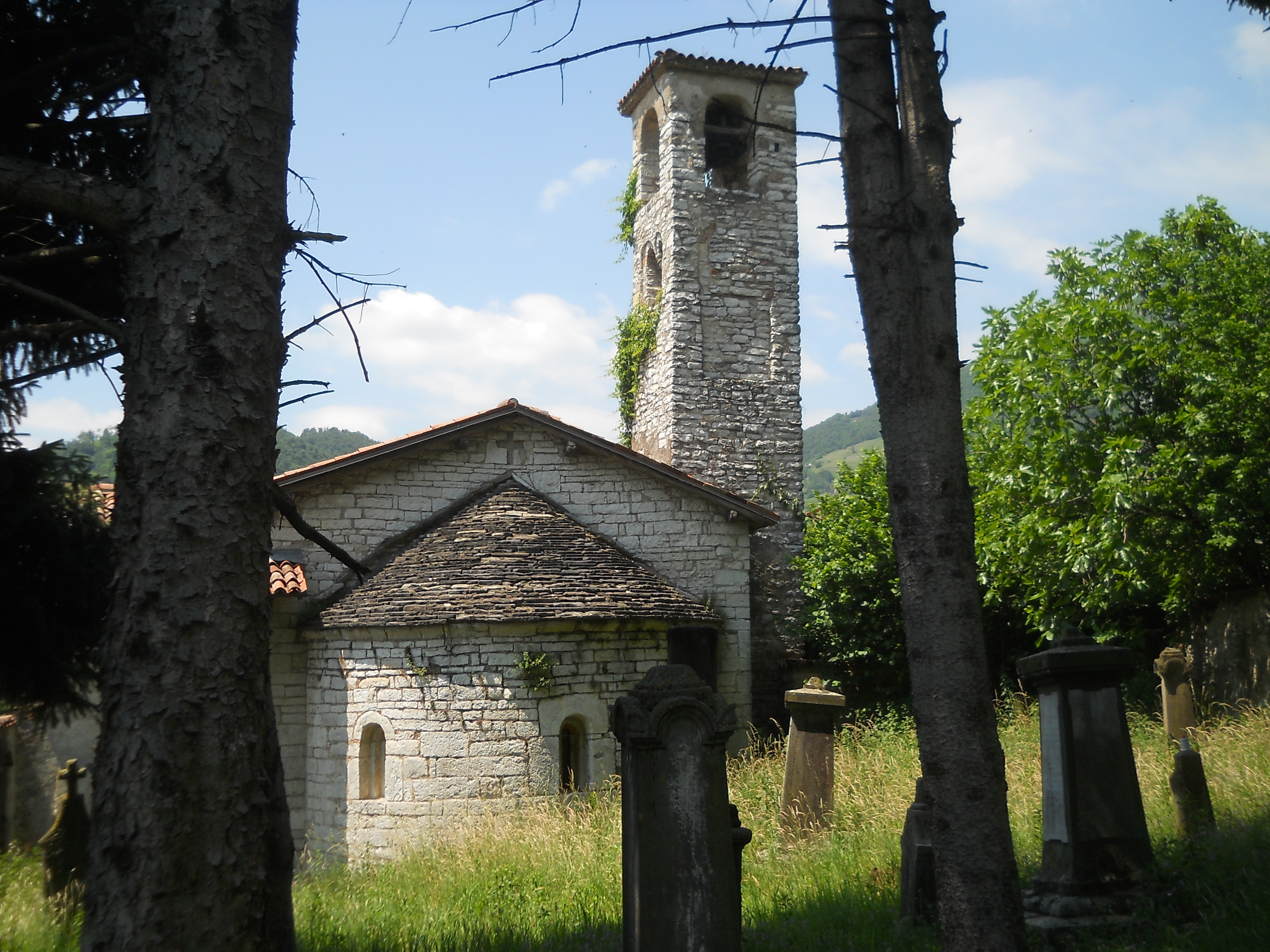 Chiesa romanica del complesso di Sant'Alessandro in Canzanica ad Adrara San Martino